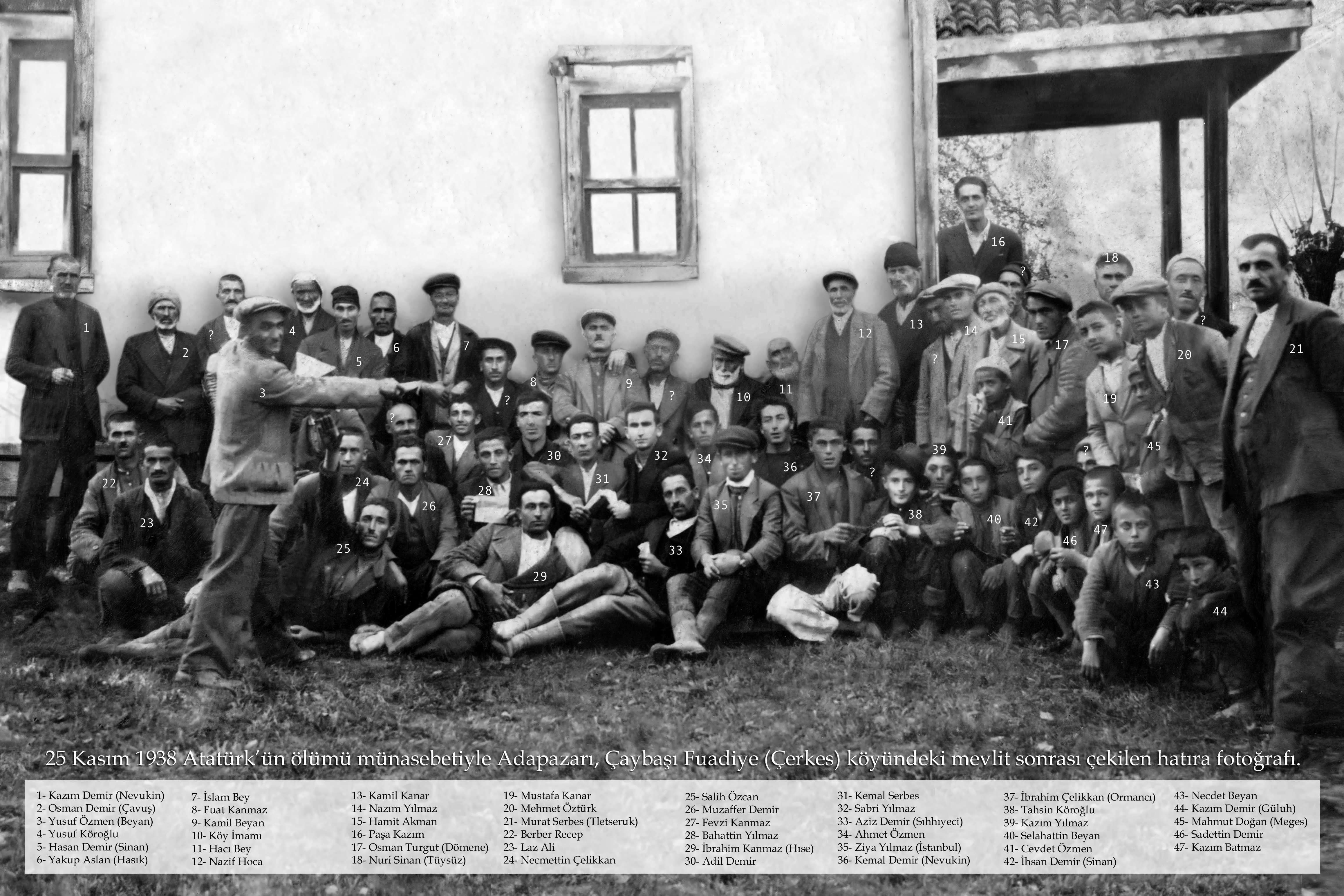 25 Kasım 1938'de Atatürk'ün ölümü münasebetiyle Çaybaşı Fuadiye köyündeki mevlit sonrası çekilen hatıra fotoğrafı.